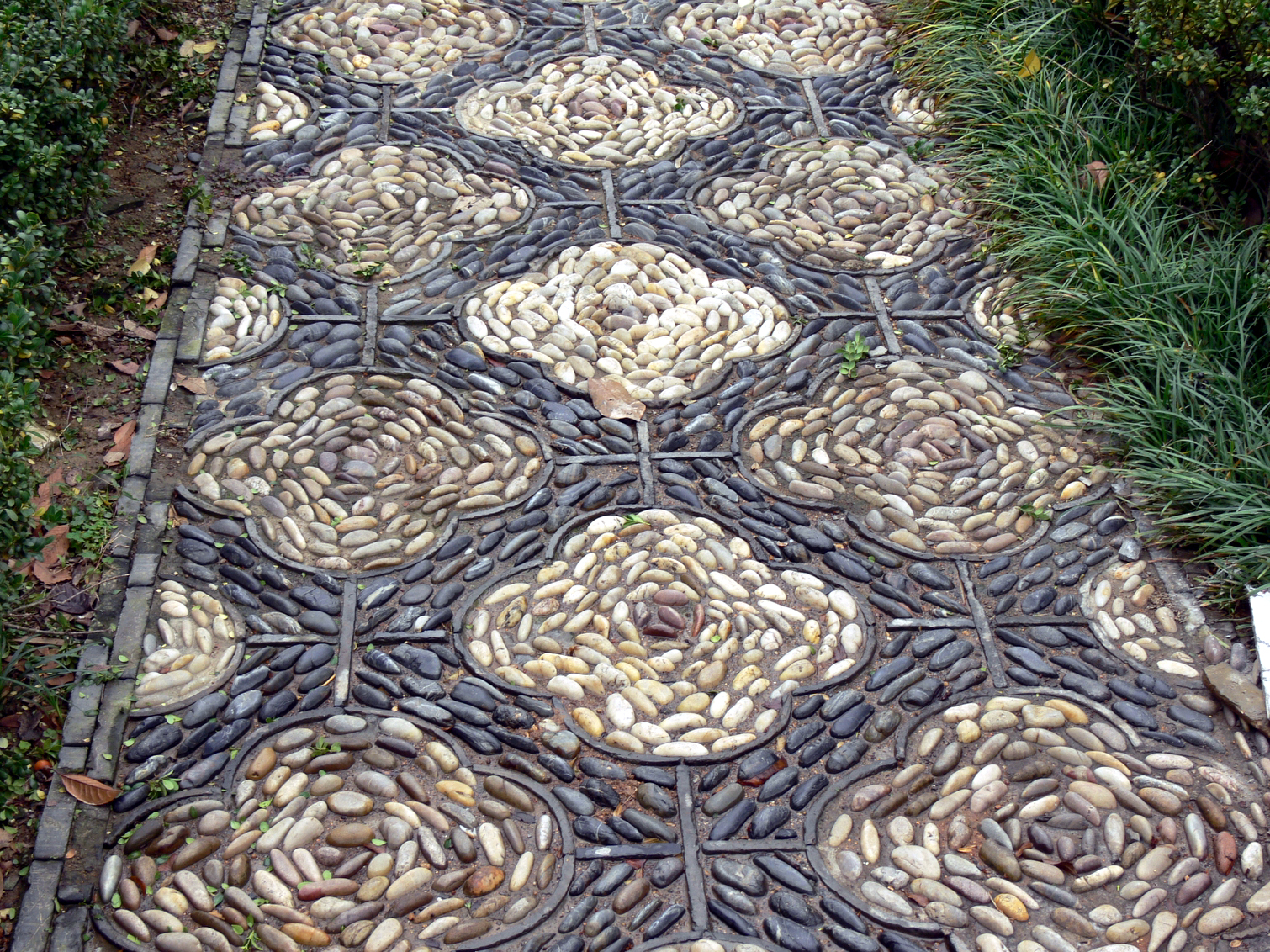 Pebble lane鹅卵石地